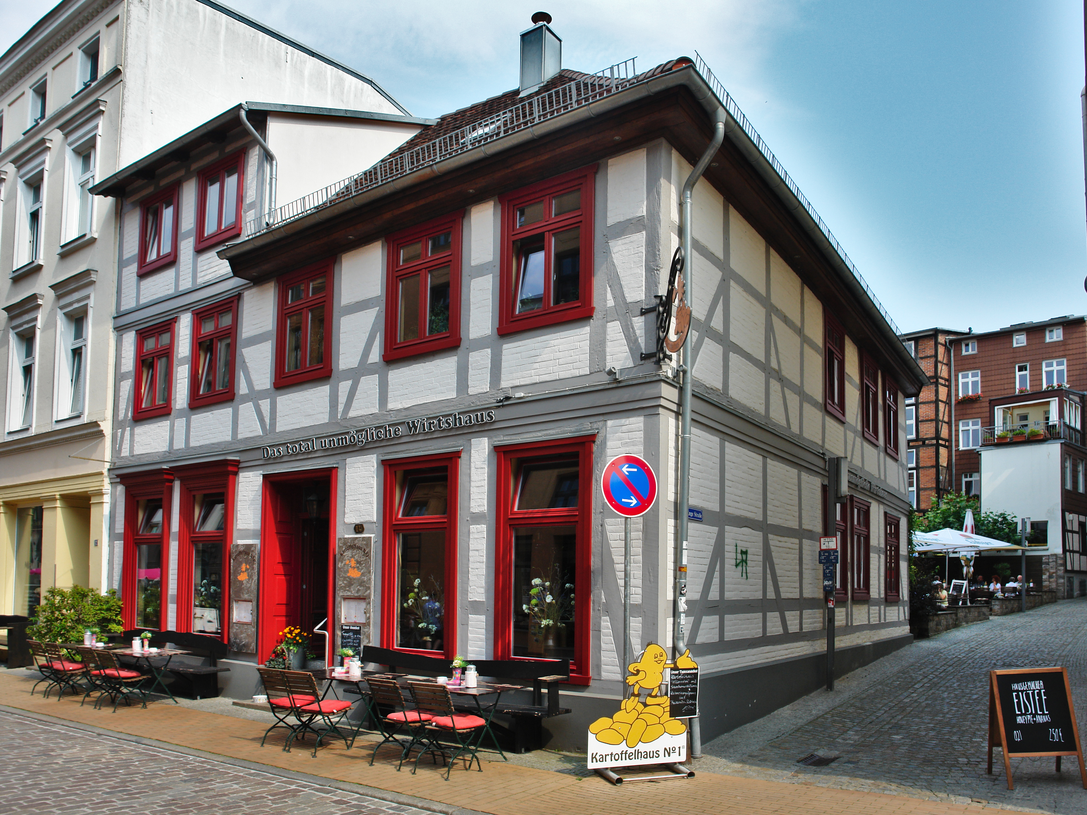 Buschstraße 14, 19053 Schwerin, Blick auf die Hausecke